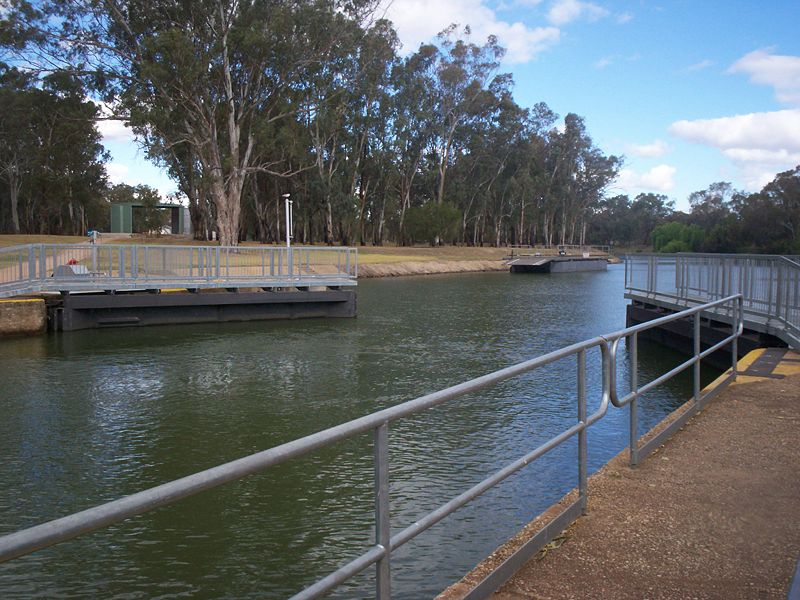 Ecluse n°11 sur le Murray, près de Mildura